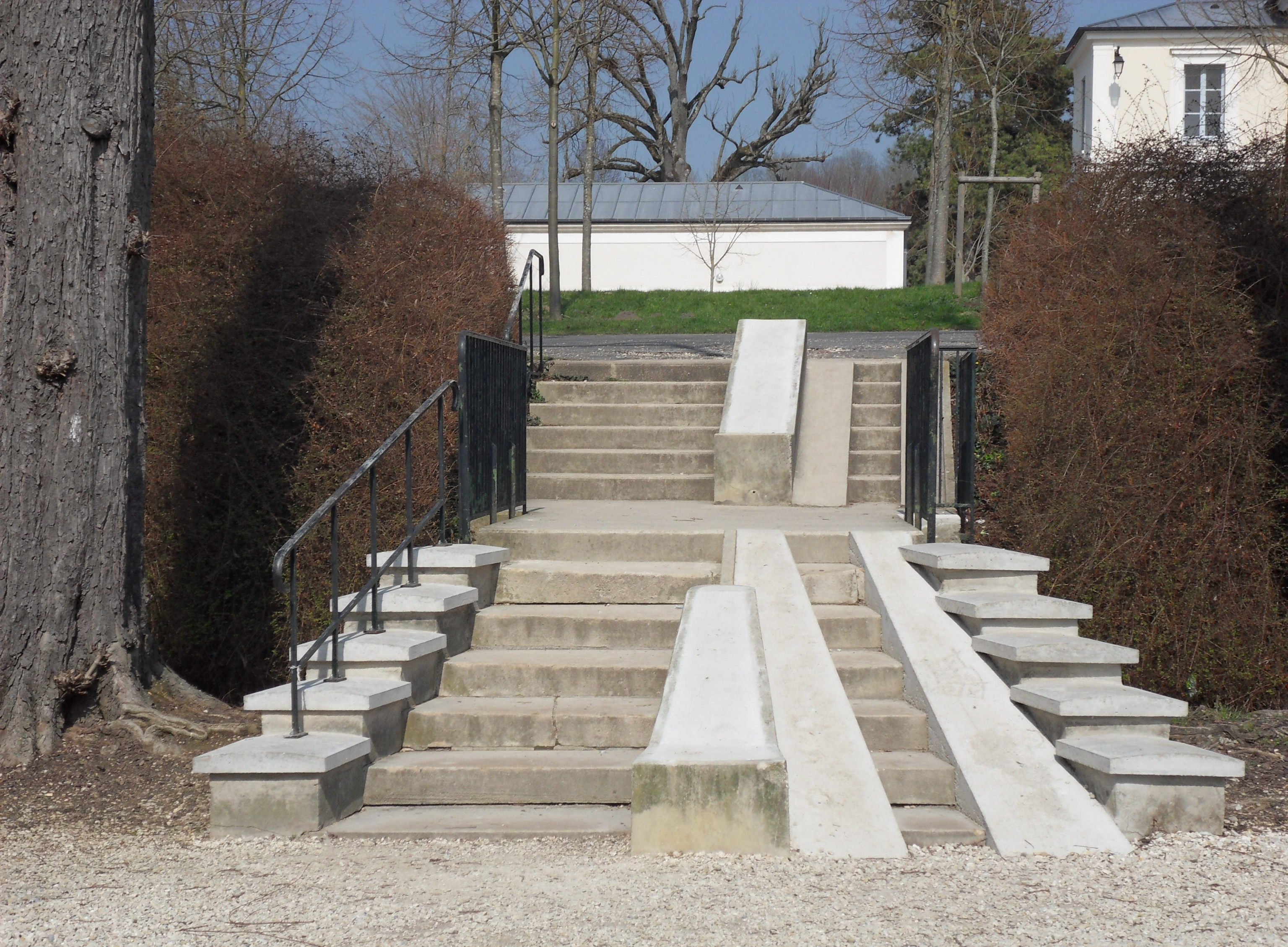 Escalier et voie d'accès poussette au sud du Boulevard d'Aligre à Provins.